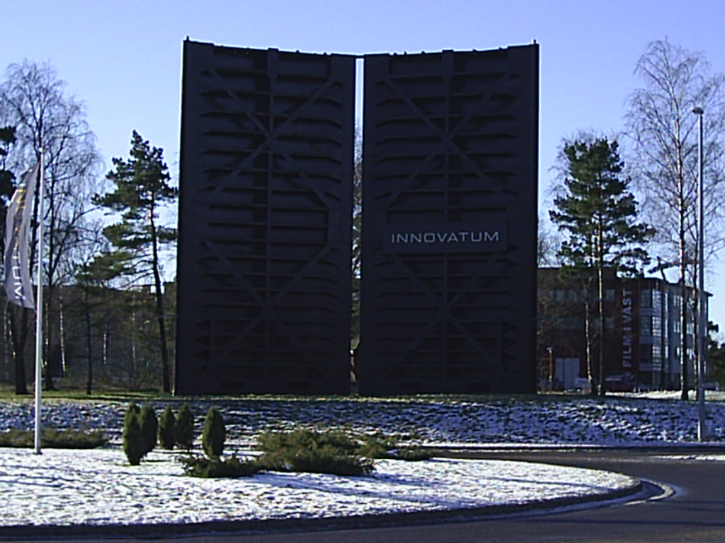 Slussportar från 1916 års slussled i Trollhätte kanal. De är placerade vid infarten till Innovatum, på Nohabs f.d. industriområde i Trollhättan. I förgrunden syns Erik Carlssons rondell. I bakgrunden t.h. syns Film i Västs lokaler. Fotograf:Tubaist